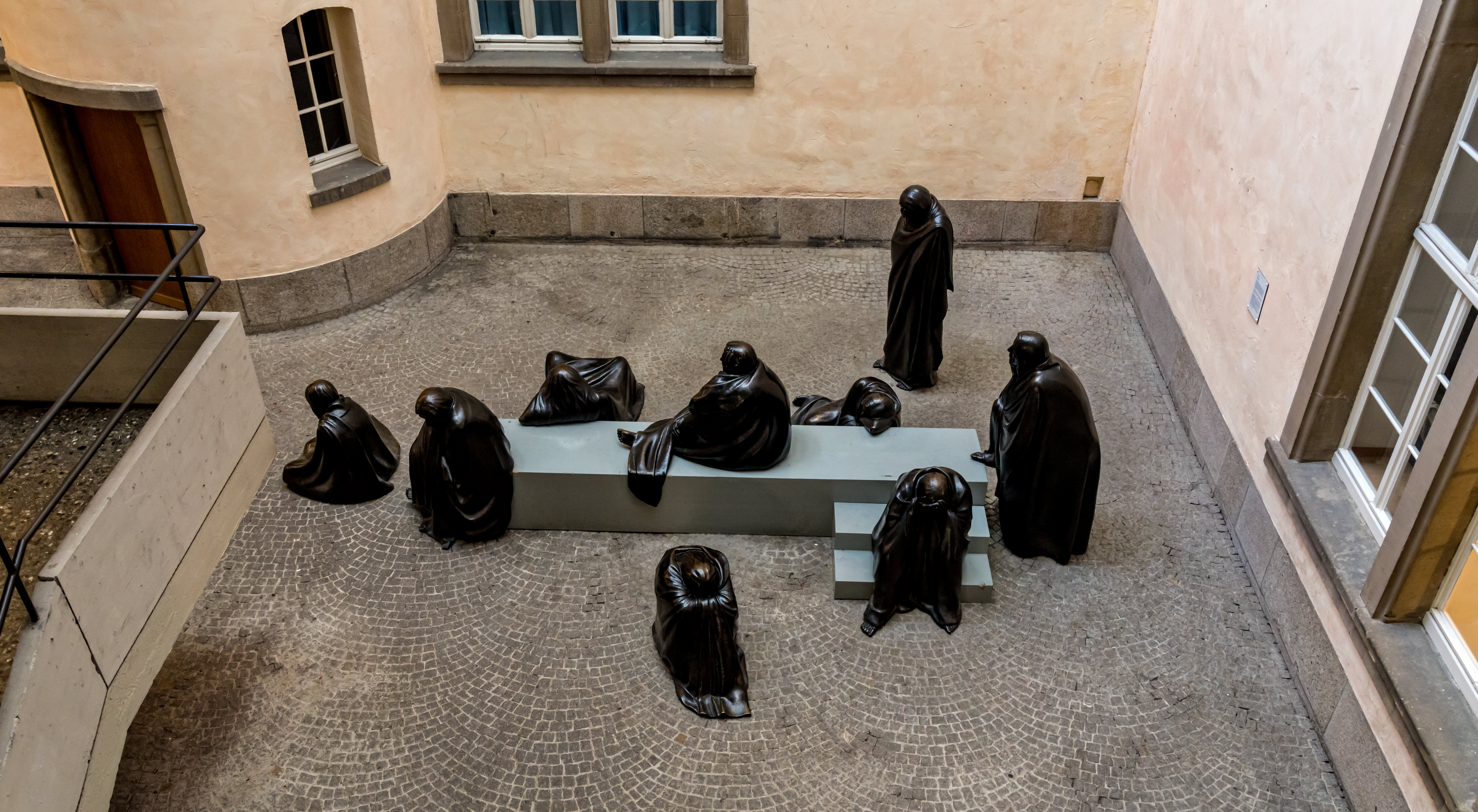 Bilder aus Freiburg Die neun Musen, Bettina Eichin, 1966